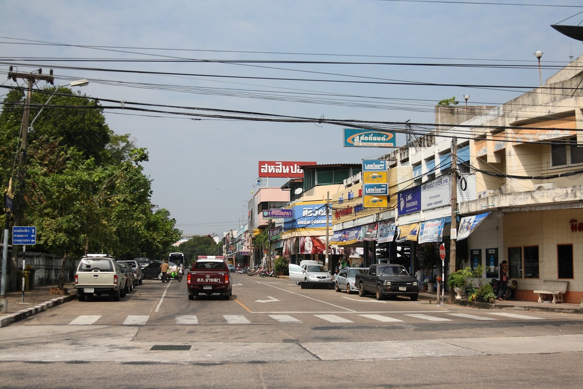 Ubon